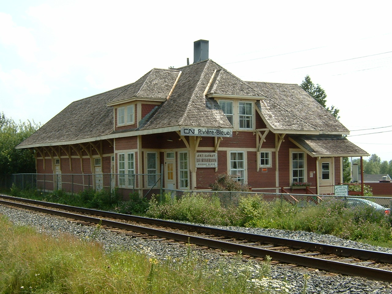 Gare de Rivière-Bleue au Témiscouata, Québec, Canada, le long du chemin de fer du Transcontinental.